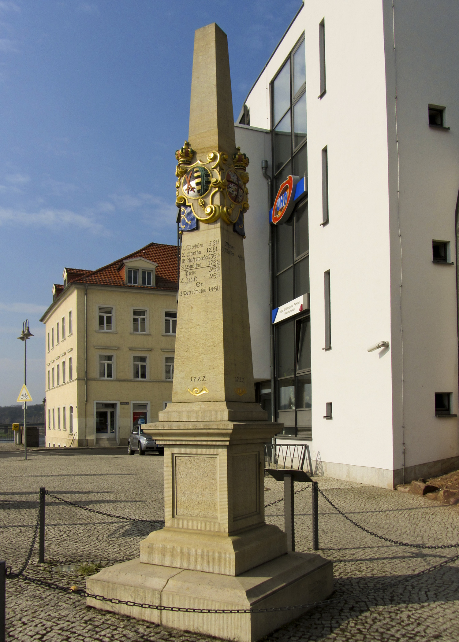 Kursächsische Postmeilensäule-Distanzsäule in Meissen